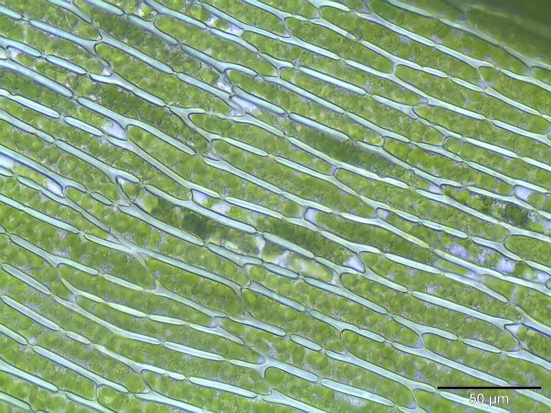 Dicranum polysetum, Lamina, 400x